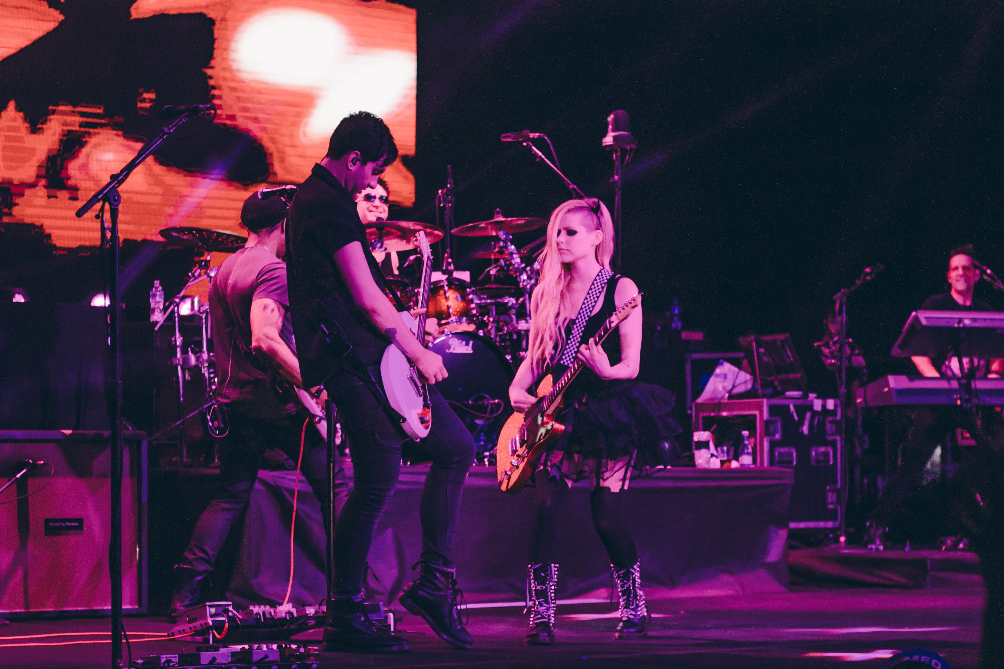 Avril Lavigne in Brasilia, Brazil in The Avril Lavigne Tour